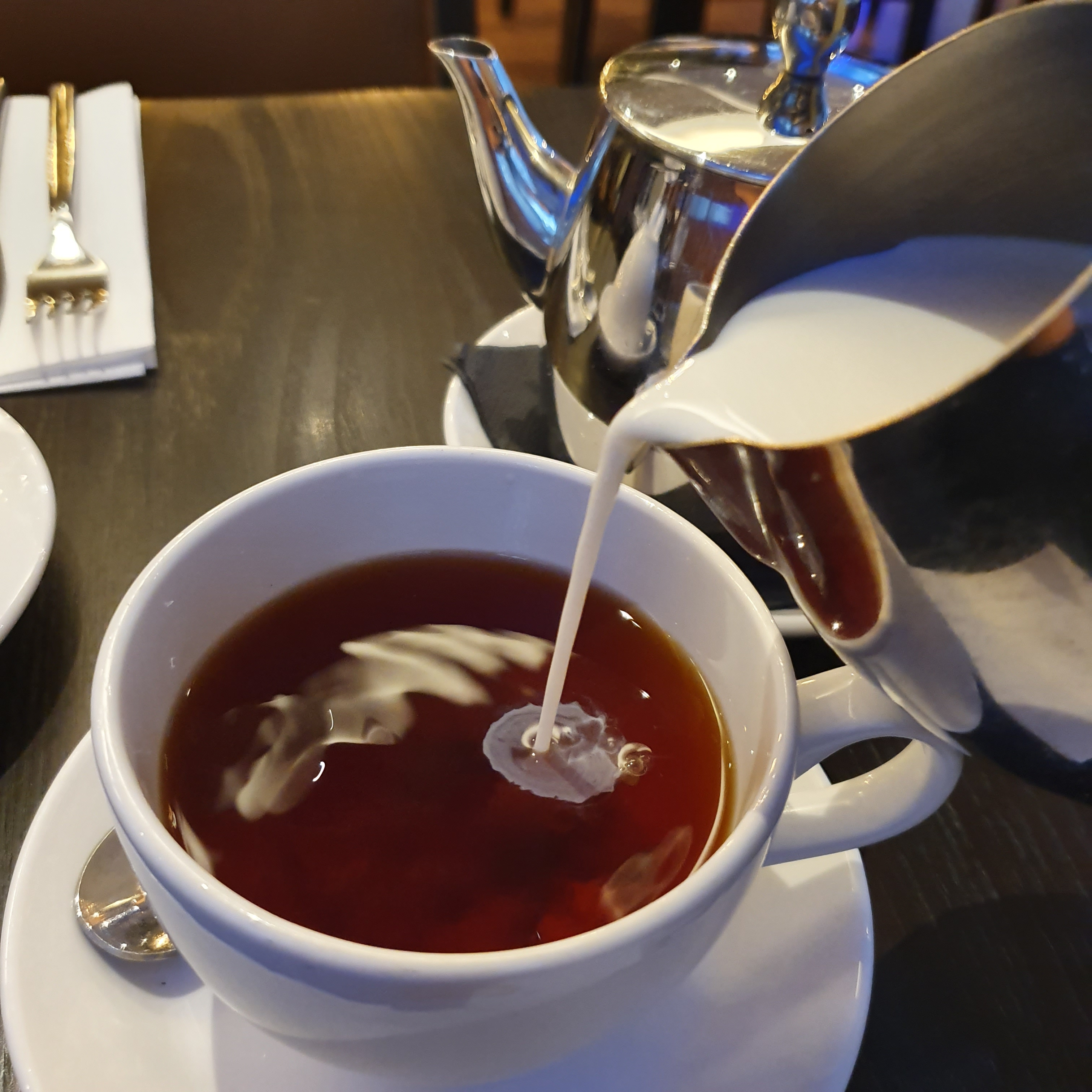 Du lait versé dans une tasse de thé Irish Breakfast.